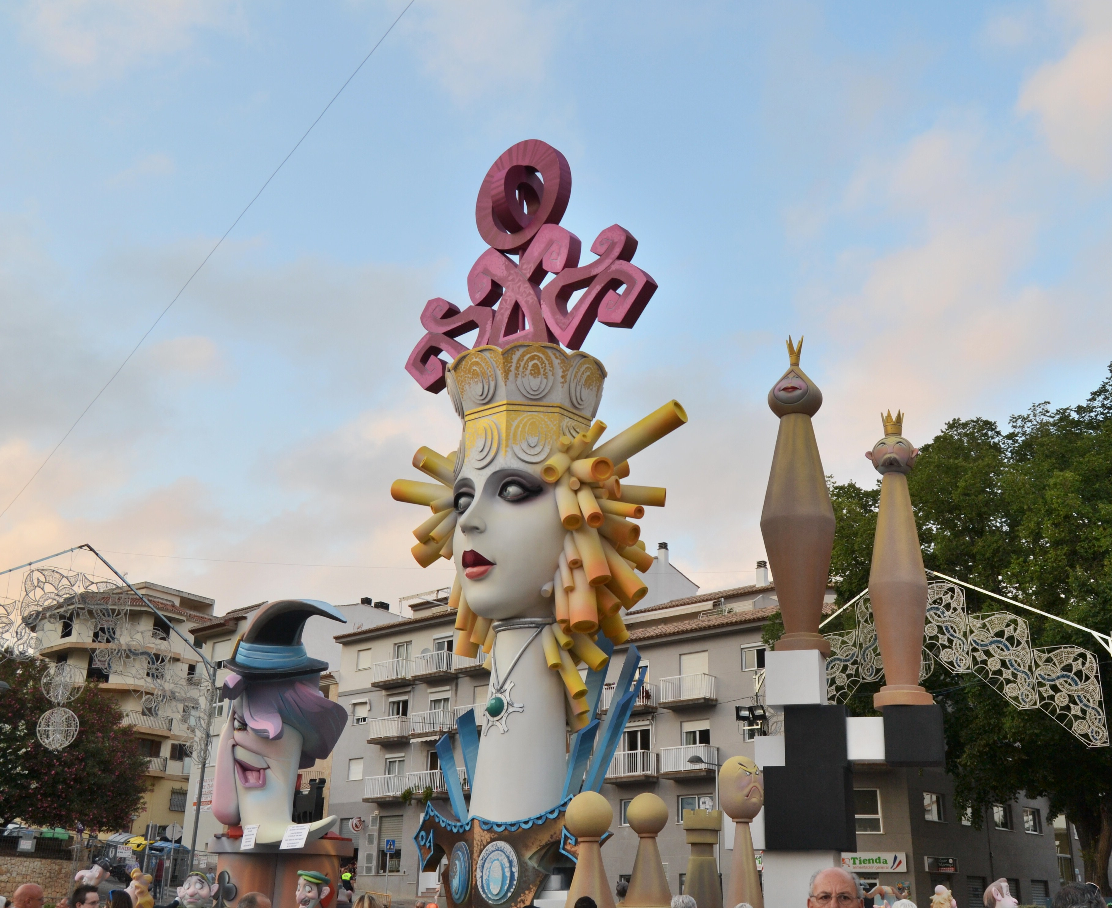 Xàbia, falla de sant Joan.